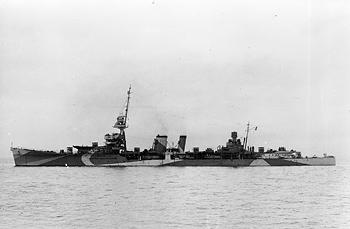 HMS DURBAN underway in the Solent